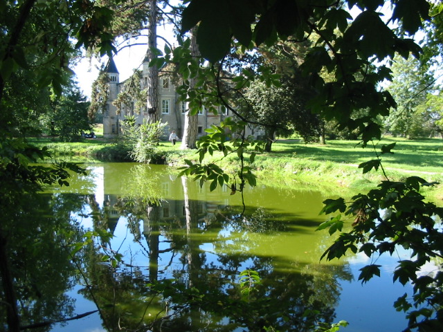 Château du Four du Vaux, à Varennes-Vauzelles